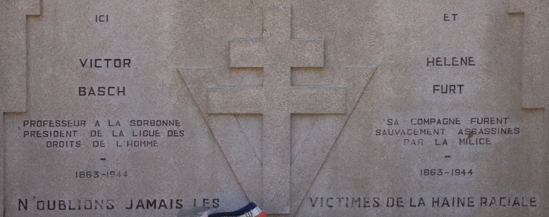 Mémorial Hélène et Victor Bach à Neyron, dans l'Ain.